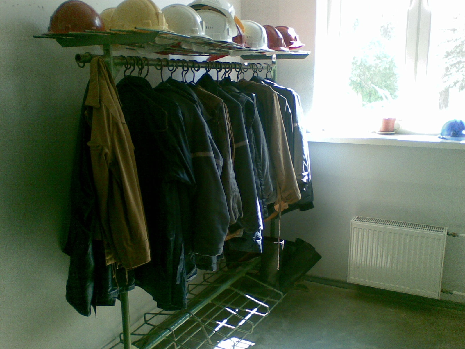 Allmaakaevanduse külastamiseks tuleb ekskursantidel panna selga kaevurirõivad. Kohtla kaevanduspark-muuseum